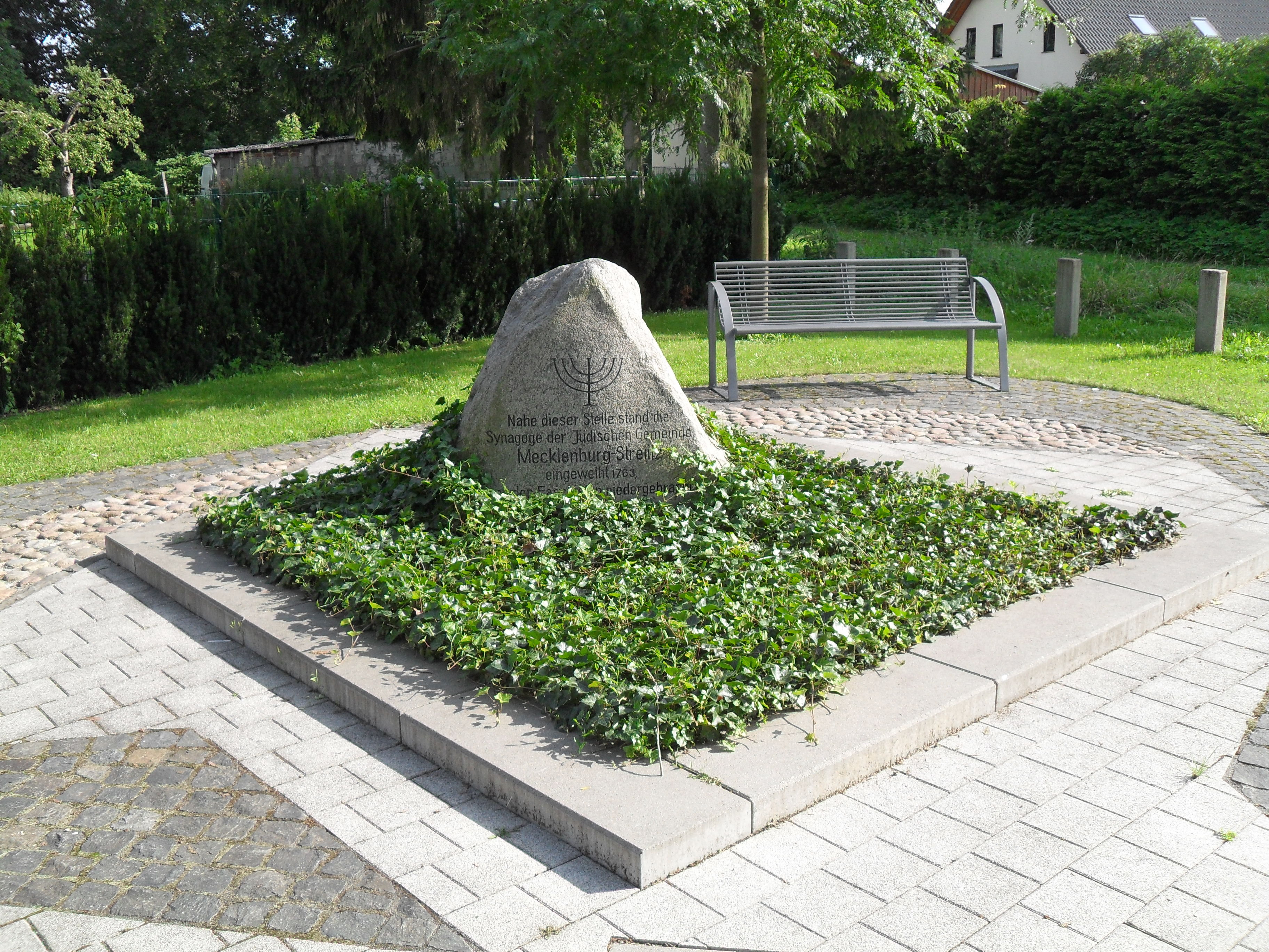 Die Altstrelitzer Synagoge wurde am 5. September 1763 eingeweiht und in der Reichsprogromnacht (9./10, November 1938) von Nationalsozialisten durch Brandstiftung zerstört. Der Gedenkstein erinnert an das einstige Versammlungshaus der Jüdischen Gemeinde von Strelitz-Alt